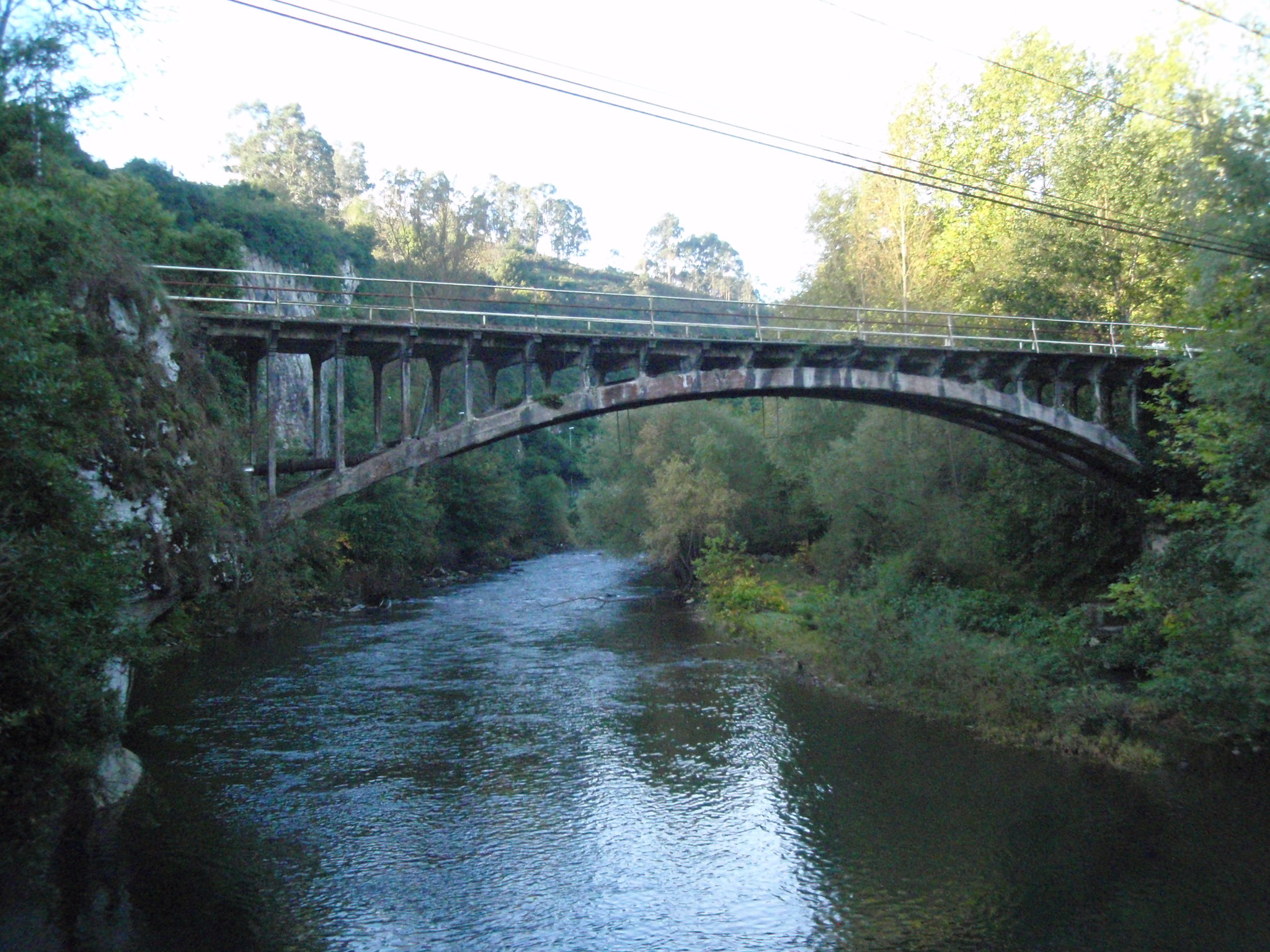 Puente sobre el Rio Saja, en Golbardo (Cantabria)